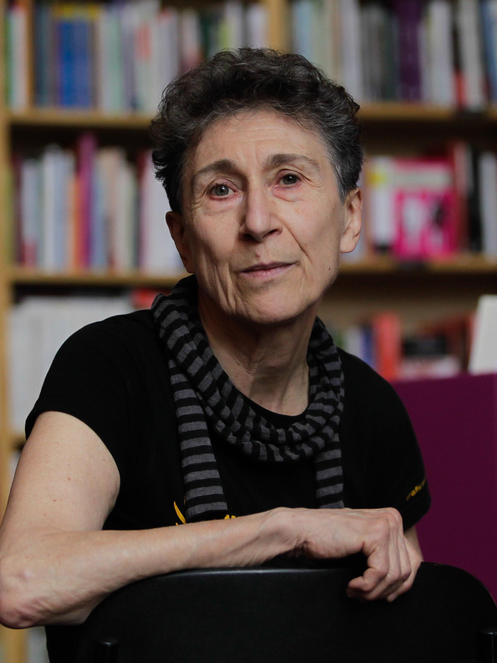 Entrevista con la pensadora feminista Silvia Federici, que reivindica que el trabajo reproductivo y de cuidados que hacen gratis las mujeres es la base sobre la que se sostiene el capitalismo. "Ahora las mujeres tienen dos trabajos -el de fuera de casa y el de dentro- y aún menos tiempo para luchar, y participar en movimientos sociales o políticos"